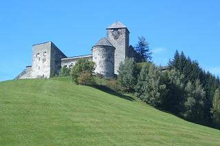 Kasteel Heinfels